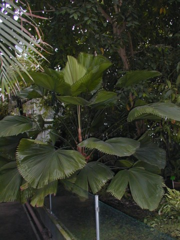 Palma - Licuala grandis